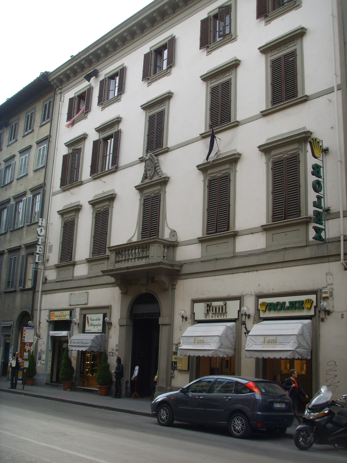 Palazzo_del_Caffè_Michelangelo florence italy